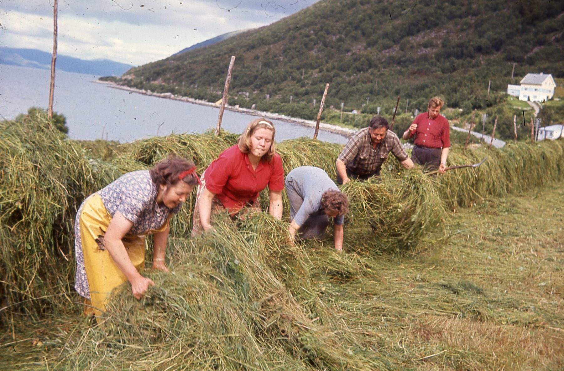 Hesjing i Møre og Romsdal kring 1966